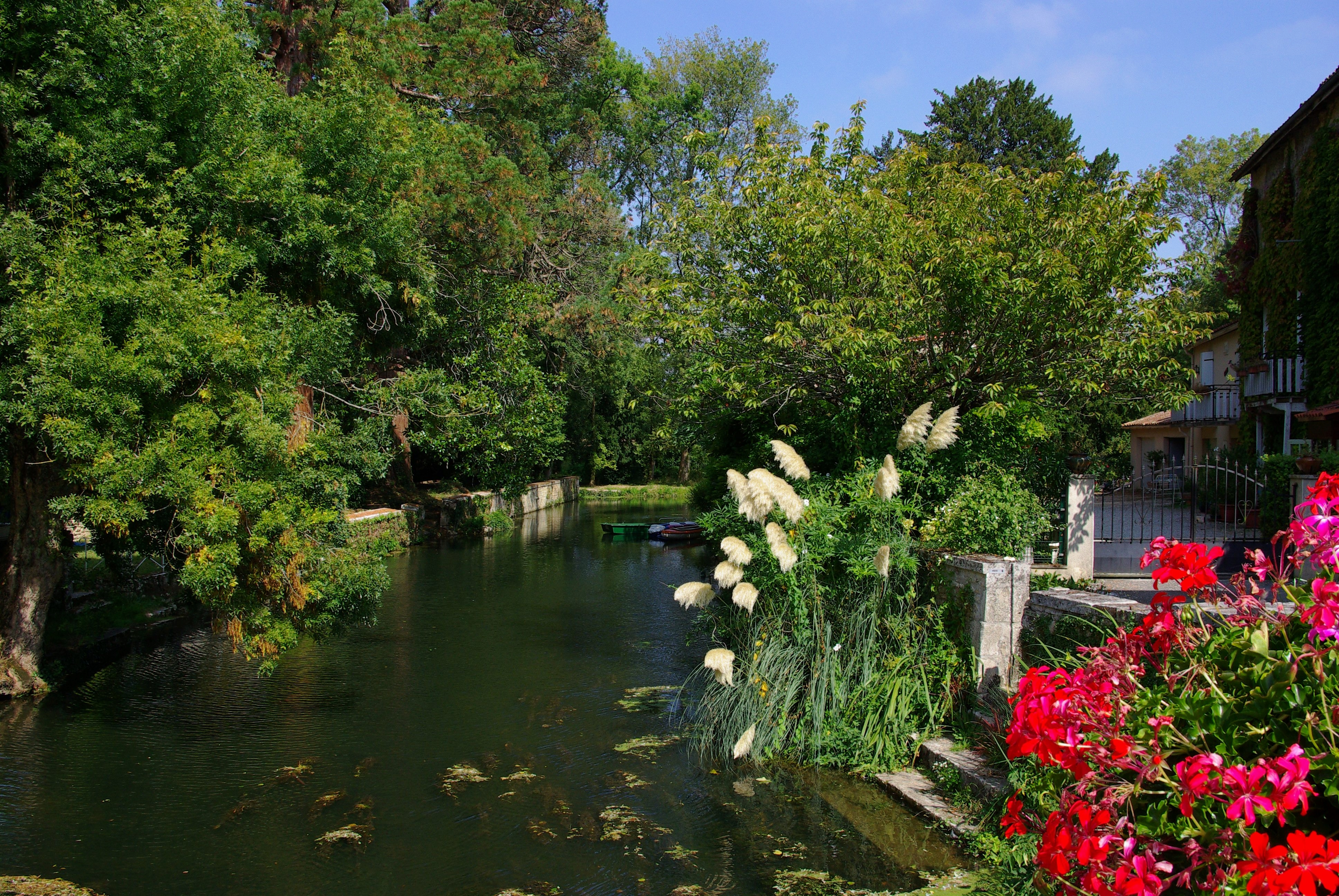 Le cours de la Charente à Verteuil-sur-Charente, France.